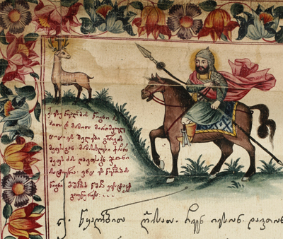 1799. ირაკლი II-ის სითარხნის წიგნი ტფილისის წმ. ევსტატის ყმებისადმი